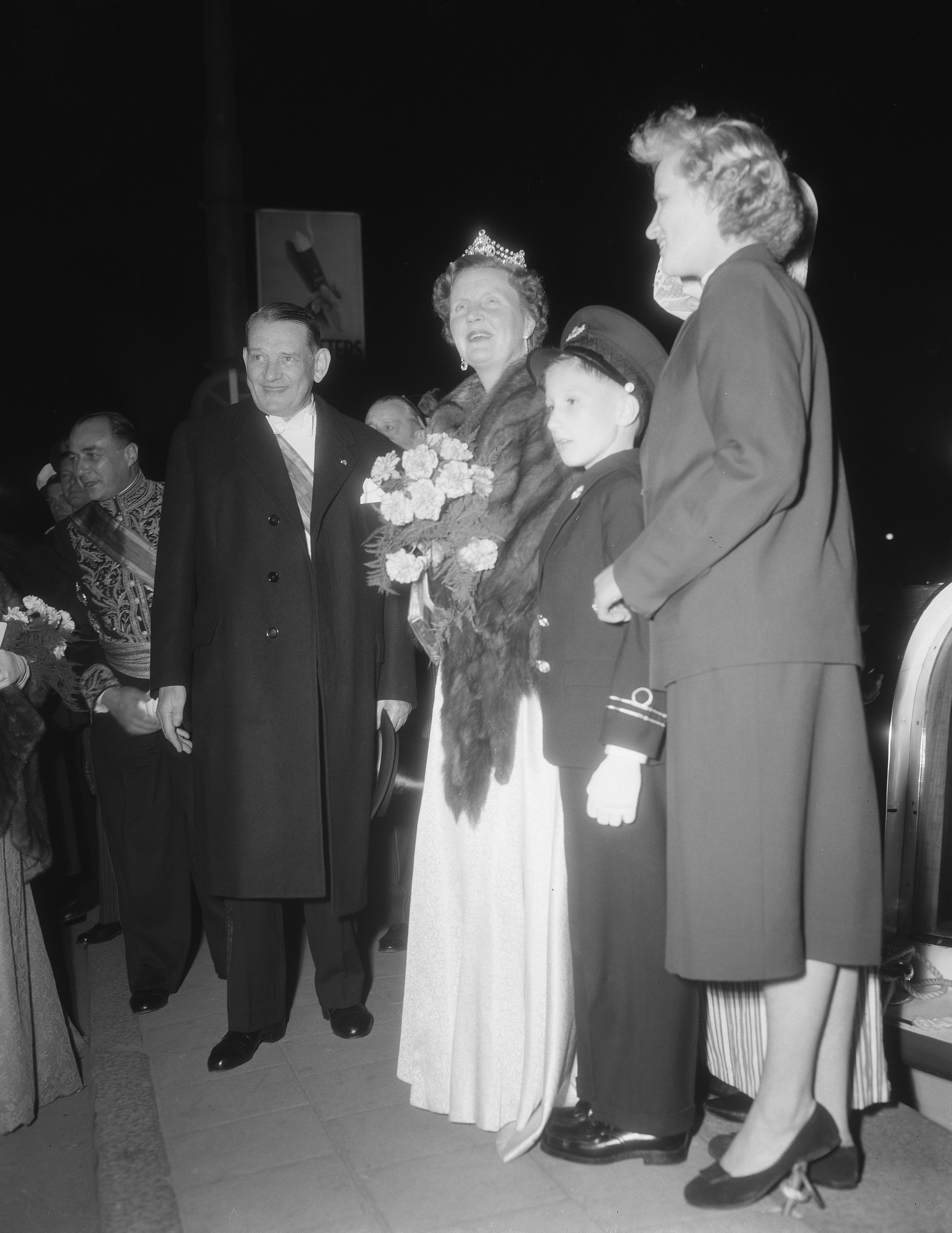 Collectie / Archief : Fotocollectie Anefo Reportage / Serie : [ onbekend ] Beschrijving : Bezoek Franse president en mevrouw Coty aan Amsterdam, boottocht door havens en grachten Datum : 21 juli 1954 Locatie : Amsterdam, Noord-Holland Trefwoorden : GRACHTEN, HAVENS, PRESIDENT, bezoeken, boottochten Fotograaf : Duinen, […] van / Anefo Auteursrechthebbende : Nationaal Archief Materiaalsoort : Negatief (zwart/wit) Nummer archiefinventaris : bekijk toegang 2.24.01.04 Bestanddeelnummer : 906-6108